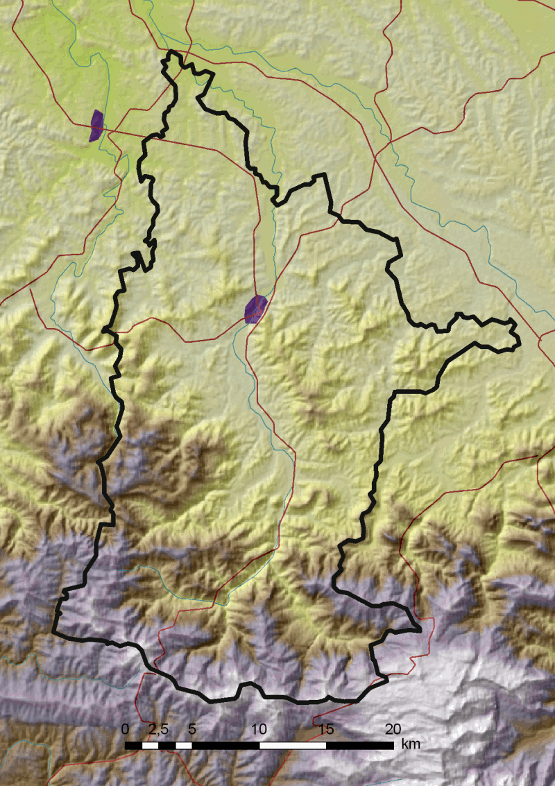 Zuberoaren mapa fisikoa